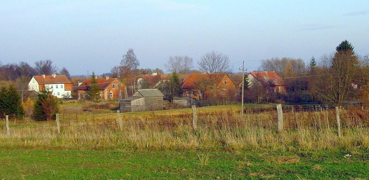 Widok na Sobiechy.